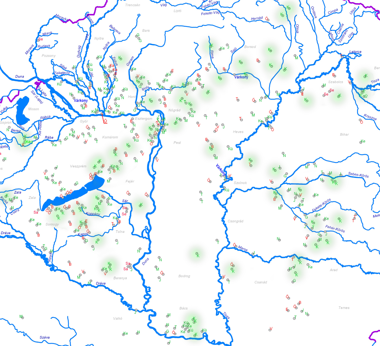 A kér törzsnév elterjedése a Kárpát-medencében